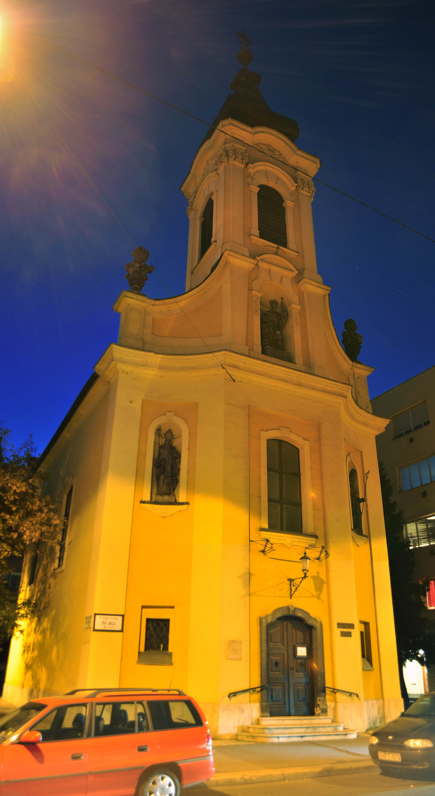 Szent Flórián Gör. kat. kápolna (Budapest 2, Fő utca 88., Ganz Ábrahám utca 3., Fő utca 90.) This is a photo of a monument in Hungary, Identifier: 257